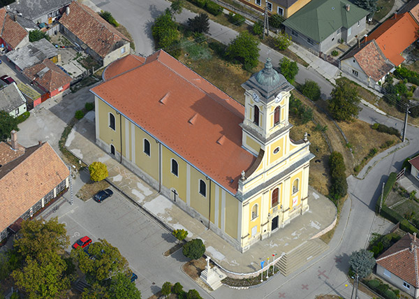 Ercsi római katolikus temploma madártávlatból